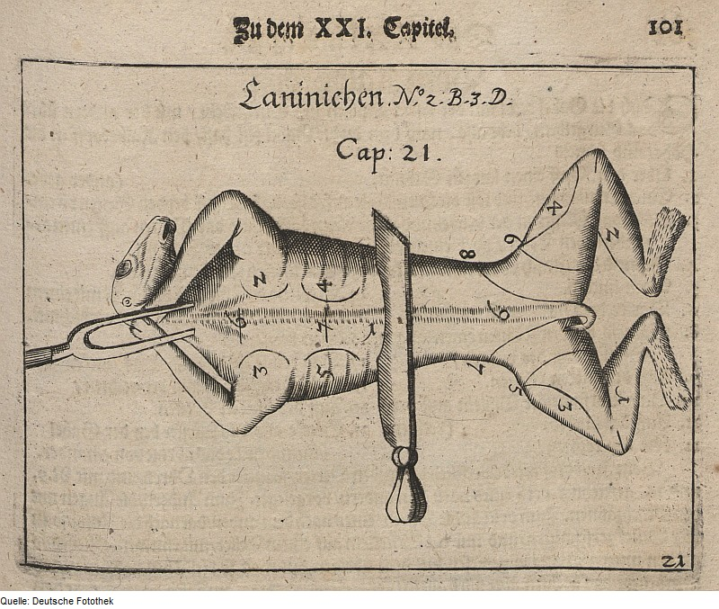 Original image description from the Deutsche Fotothek Gastronomie & Esskultur & Tischsitte & Speise & Zubereitung